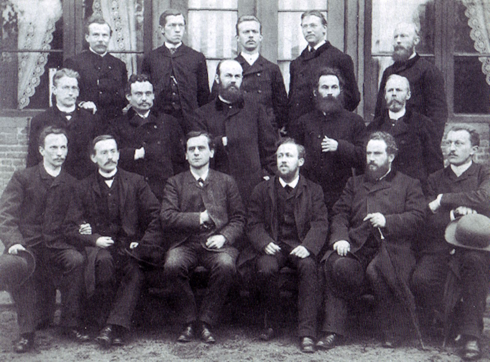 Kollegium der Schule des Rauhen Hauses, der heutigen Wichern-Schule, 1889